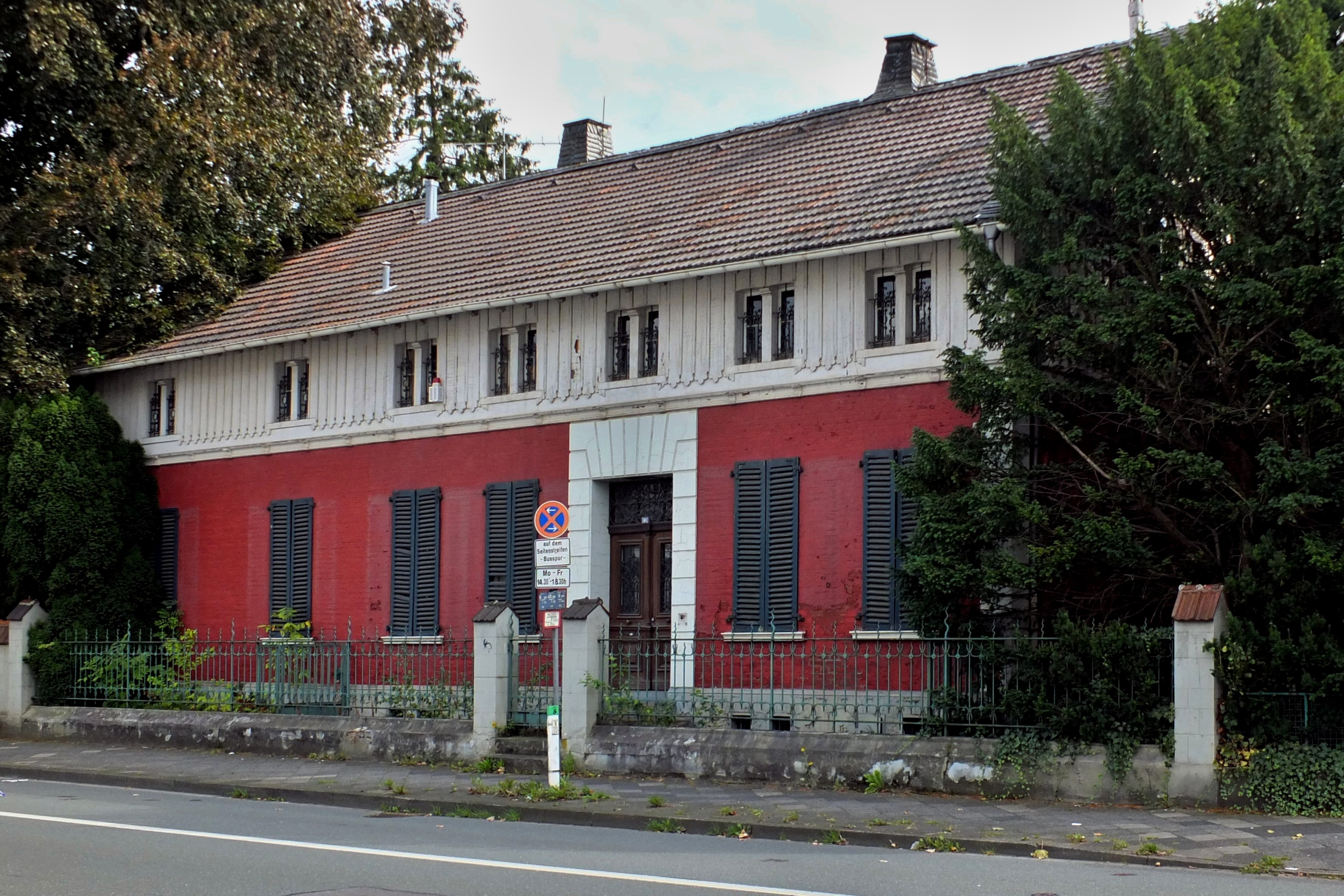 Rotes Haus, erbaut 1903 als Landsitz des Bauunternehmers Otto Nebel (* 1870), später Wohnsitz der langjährigen Bürgermeisterin Ellen Wiederhold, Hilden, Düsseldorfer Straße 101